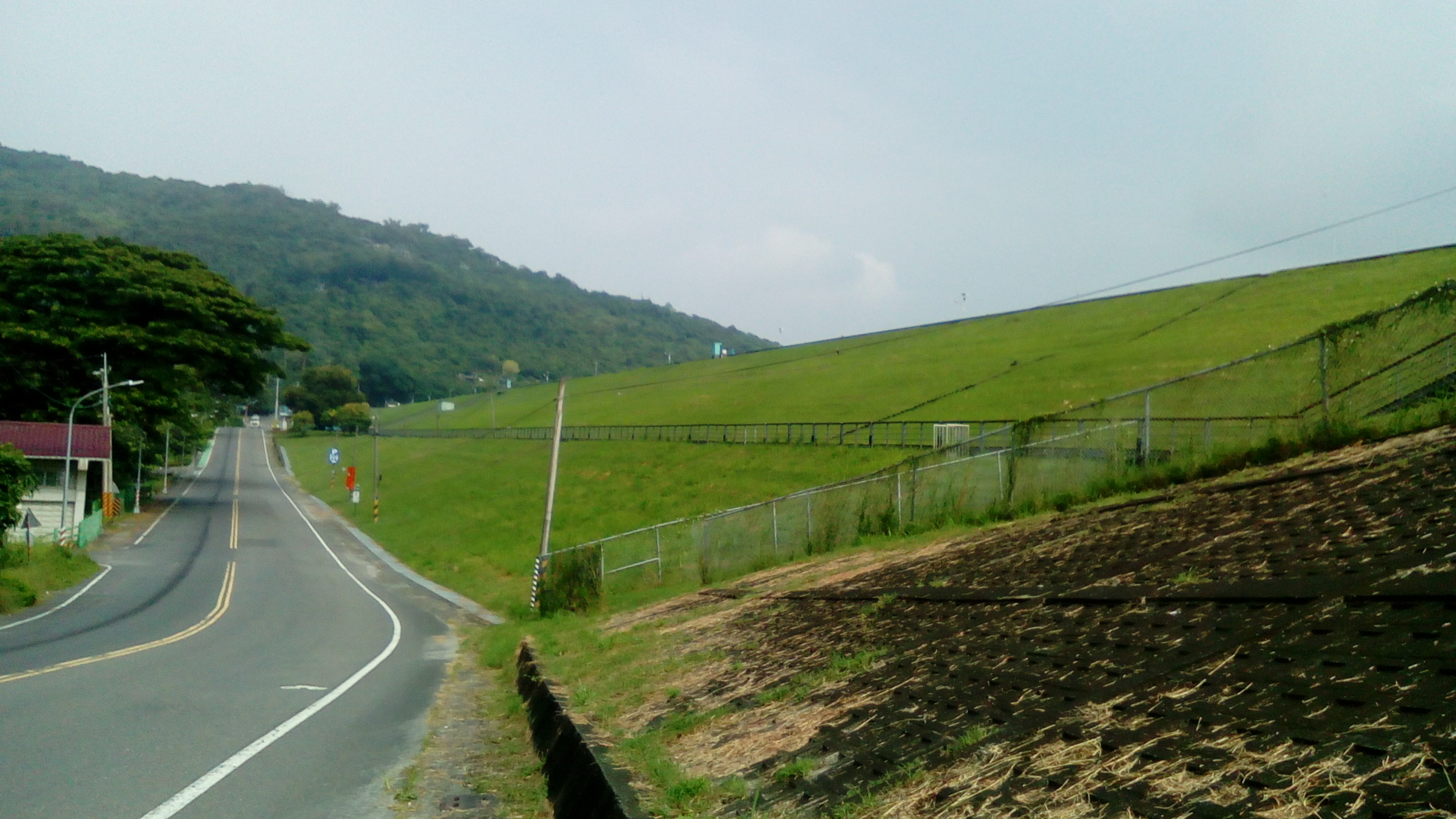 同上